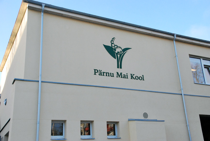 Pärnu Mai Kooli logo